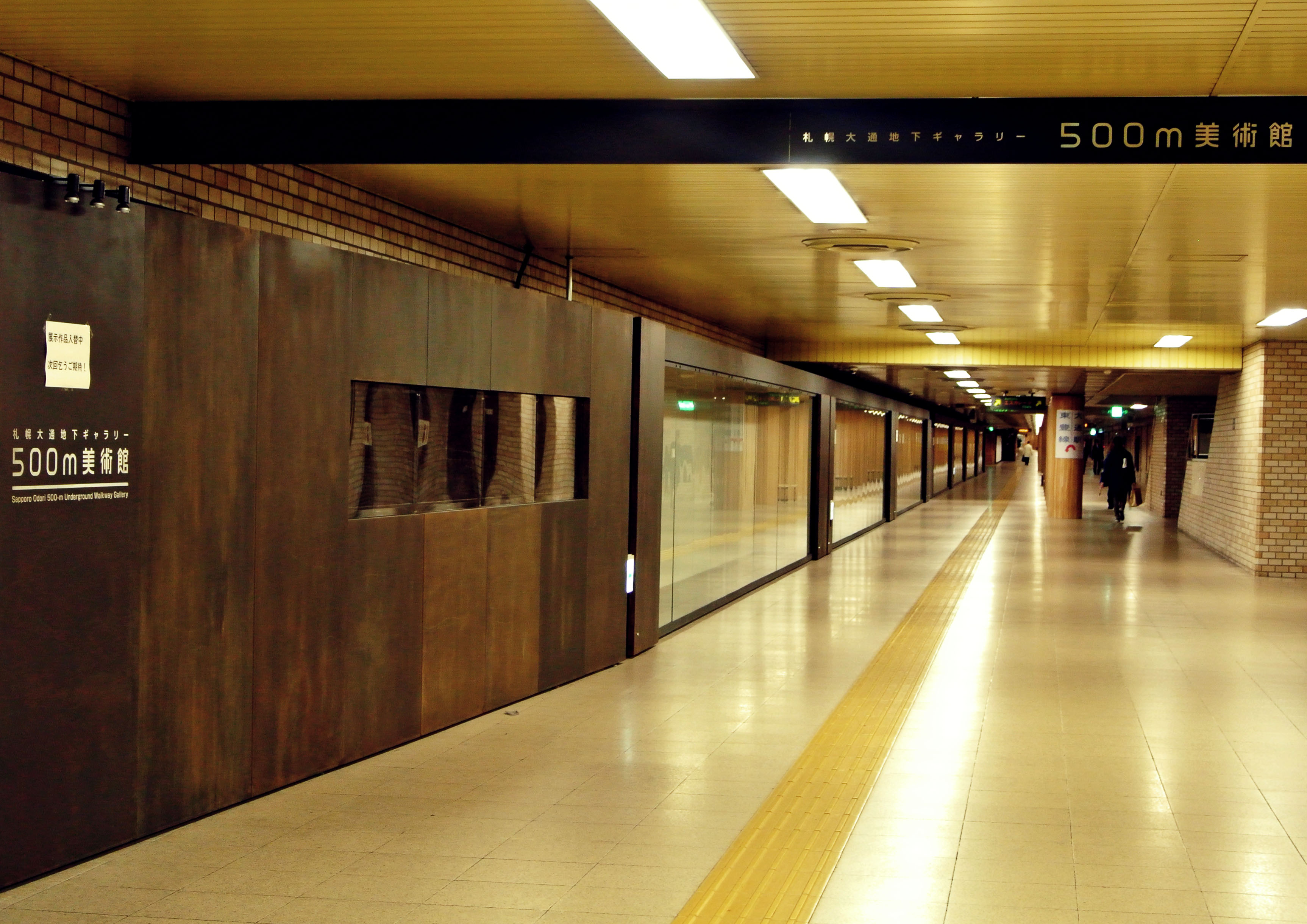 500m美術館の様子（大通駅方面から）